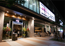 レッドロブスター 沖縄国際通り店